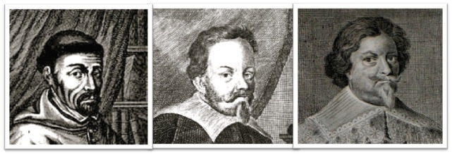 Od leva: Kašpar z Questenberku, Gerhard z Questenberku, Heřman z Questenberku; kolem roku 1610